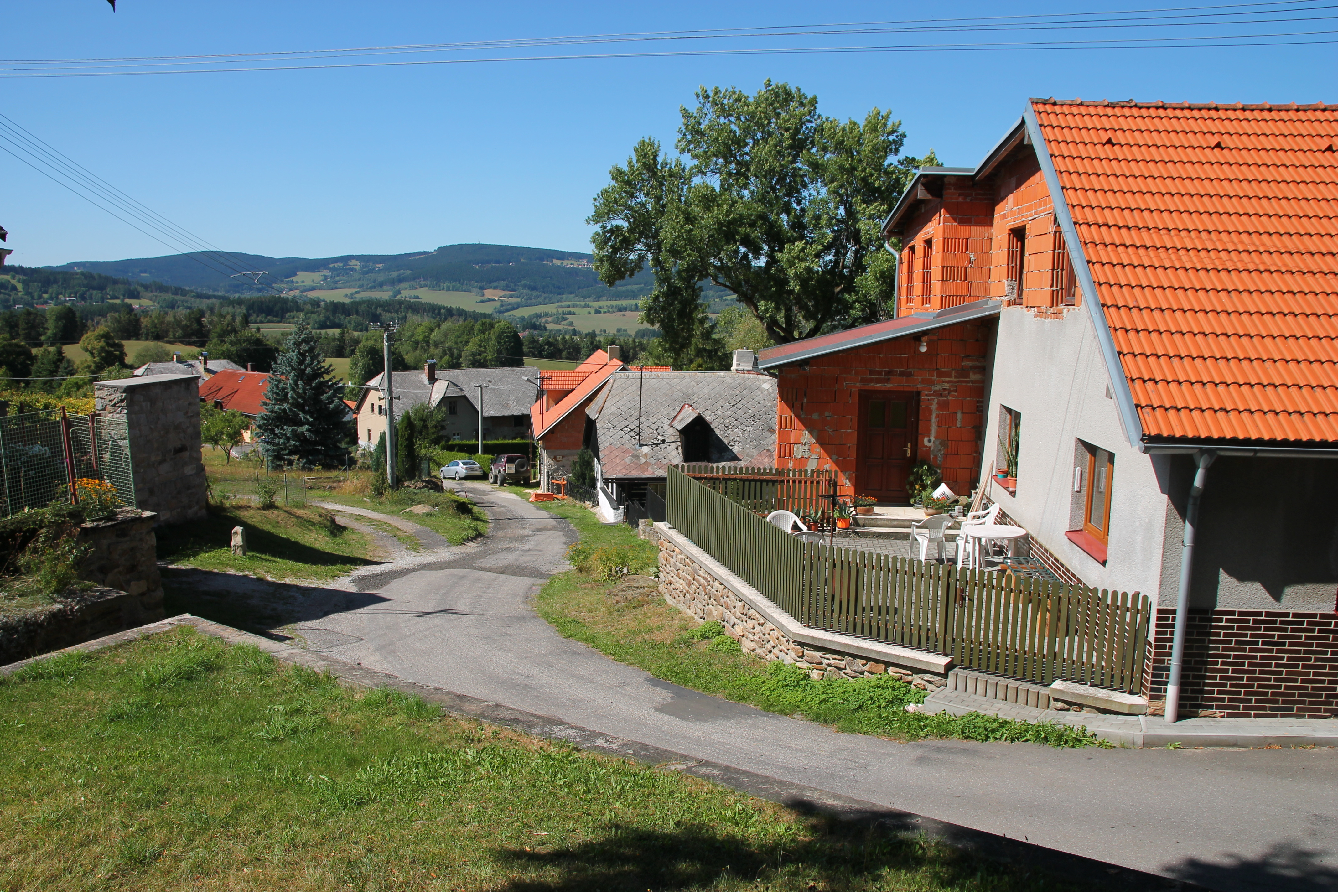 Branišov, Zdíkov, dům čp. 1